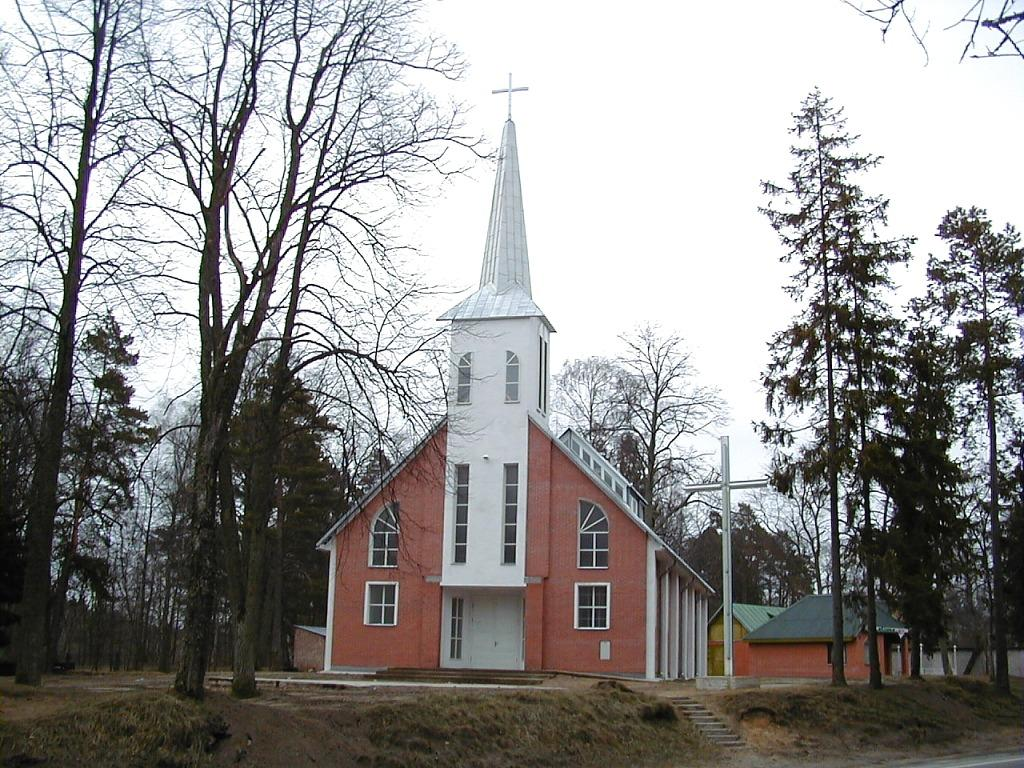 Saulkrastu katoļu baznīca 2000-04-09